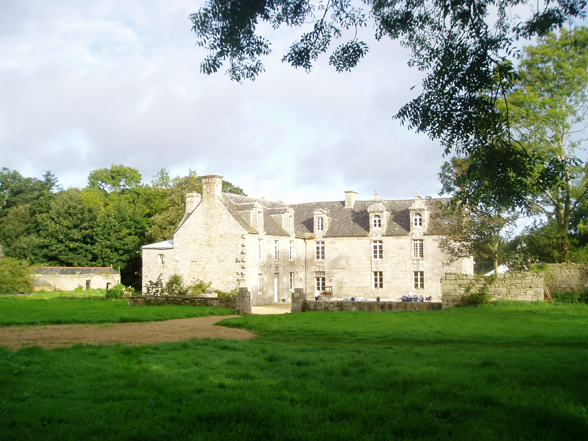 Château de Kermenguy, construit en 1632 sur les bases d'un château du 12° siècle.